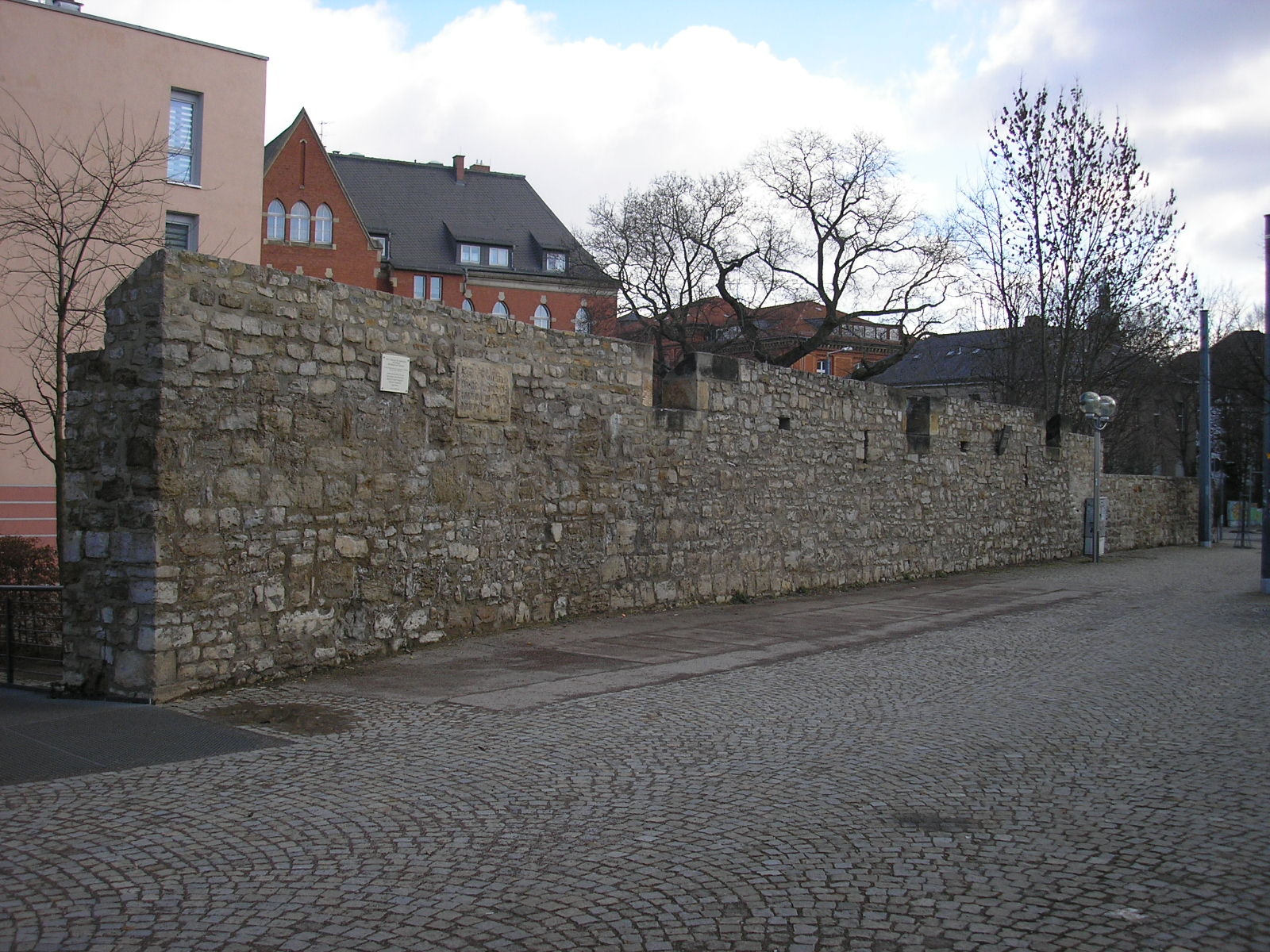 Reste der inneren Stadtmauer am Brühler Garten in Erfurt (Thüringen).